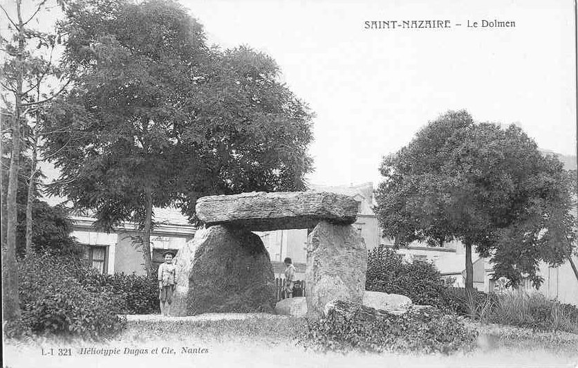 dolmen megalithe Saint-Nazaire France